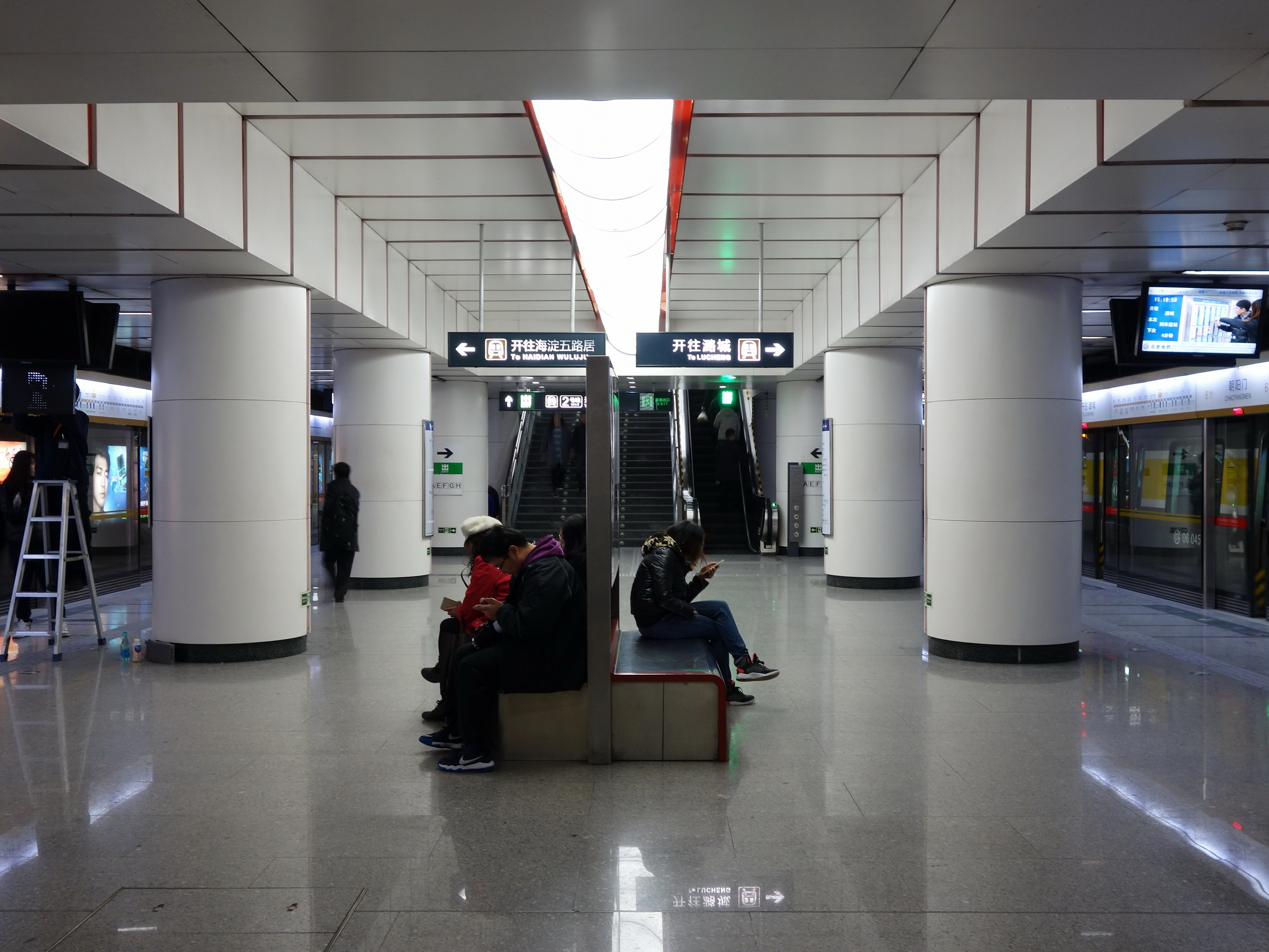 北京地铁6号线朝阳门站岛式站台